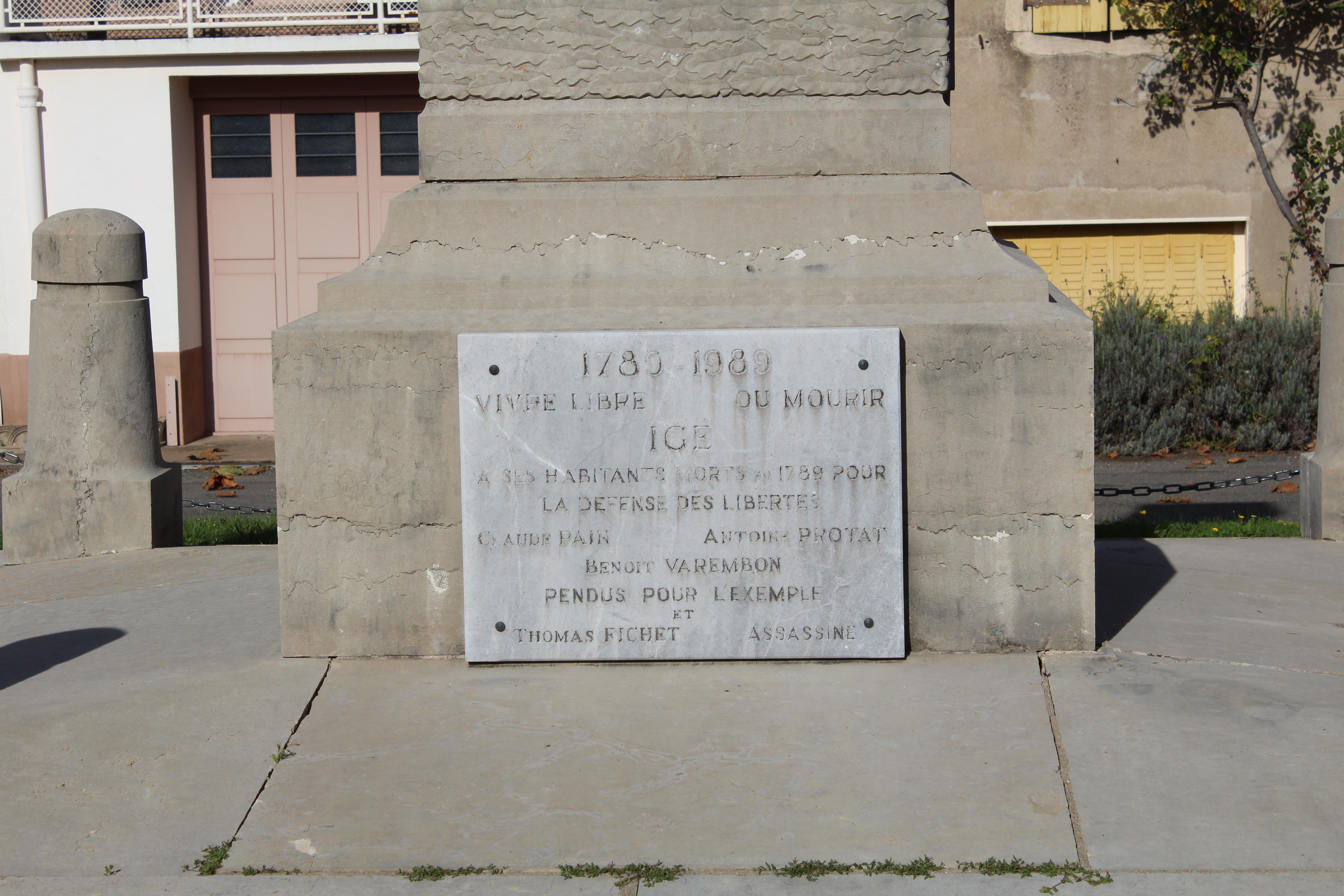 Monument aux morts d'Igé, Saône-et-Loire.